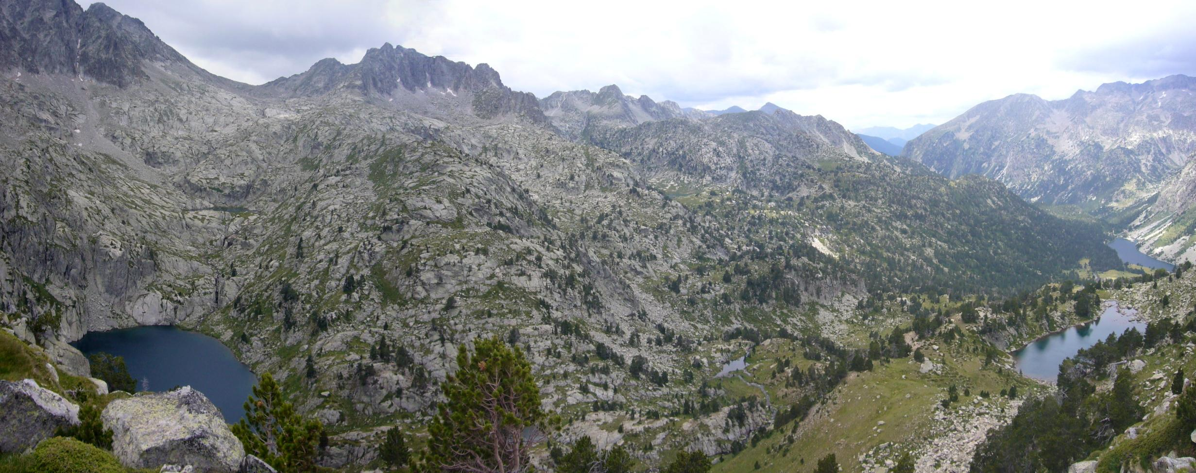 Vall de Peixerani vist des dels peus de l'Agulla del Portarró; Espot, Pallars Sobirà, Catalunya